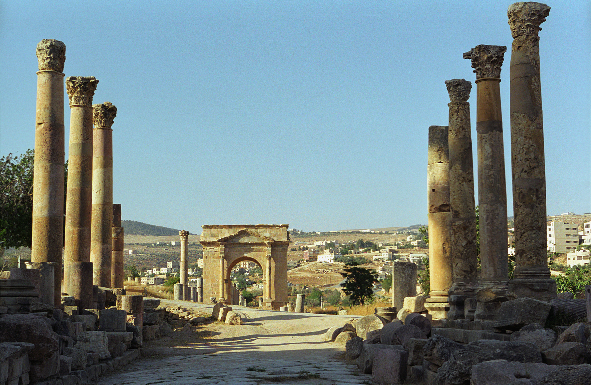 Jerash, Jordan